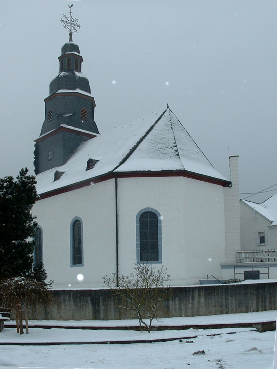 Evangelische Kirche Stipshausen